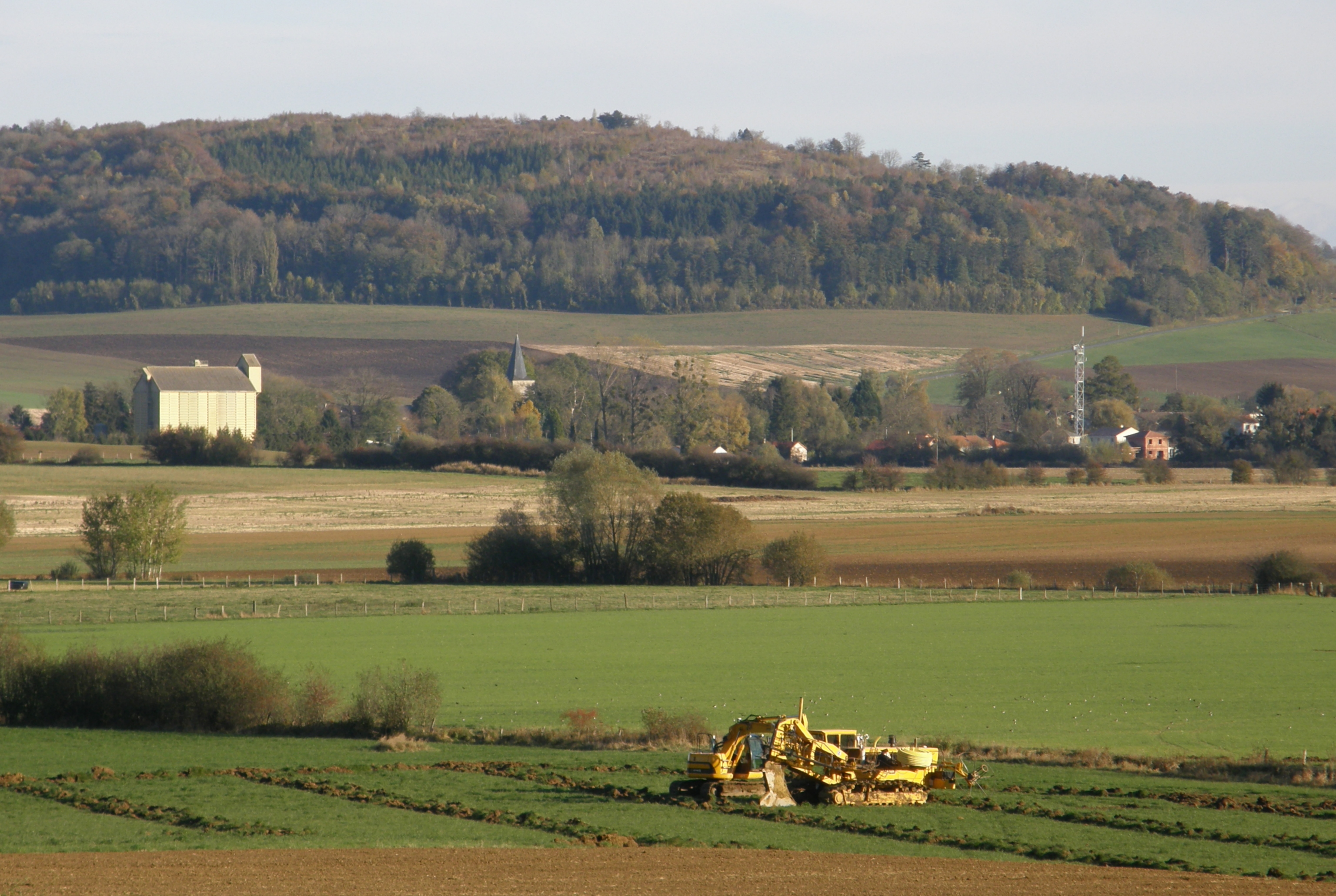 Travaux de drainage près de Damvillers (Meuse)